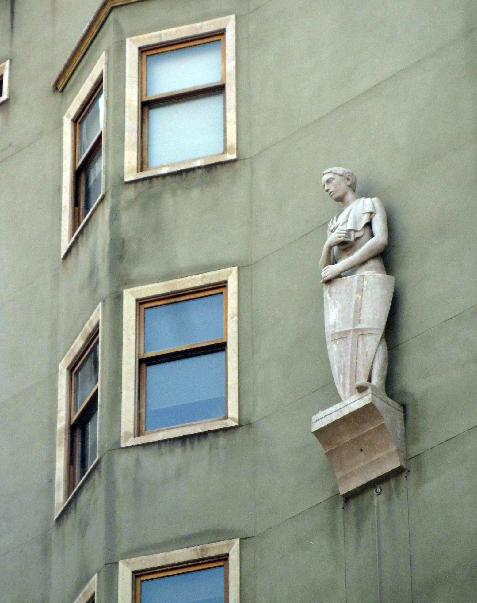 Sant Jordi (Joan Rebull). Casp, 26 cantonada amb Pau Claris, 81 -Casal de Sant Jordi- (Barcelona)